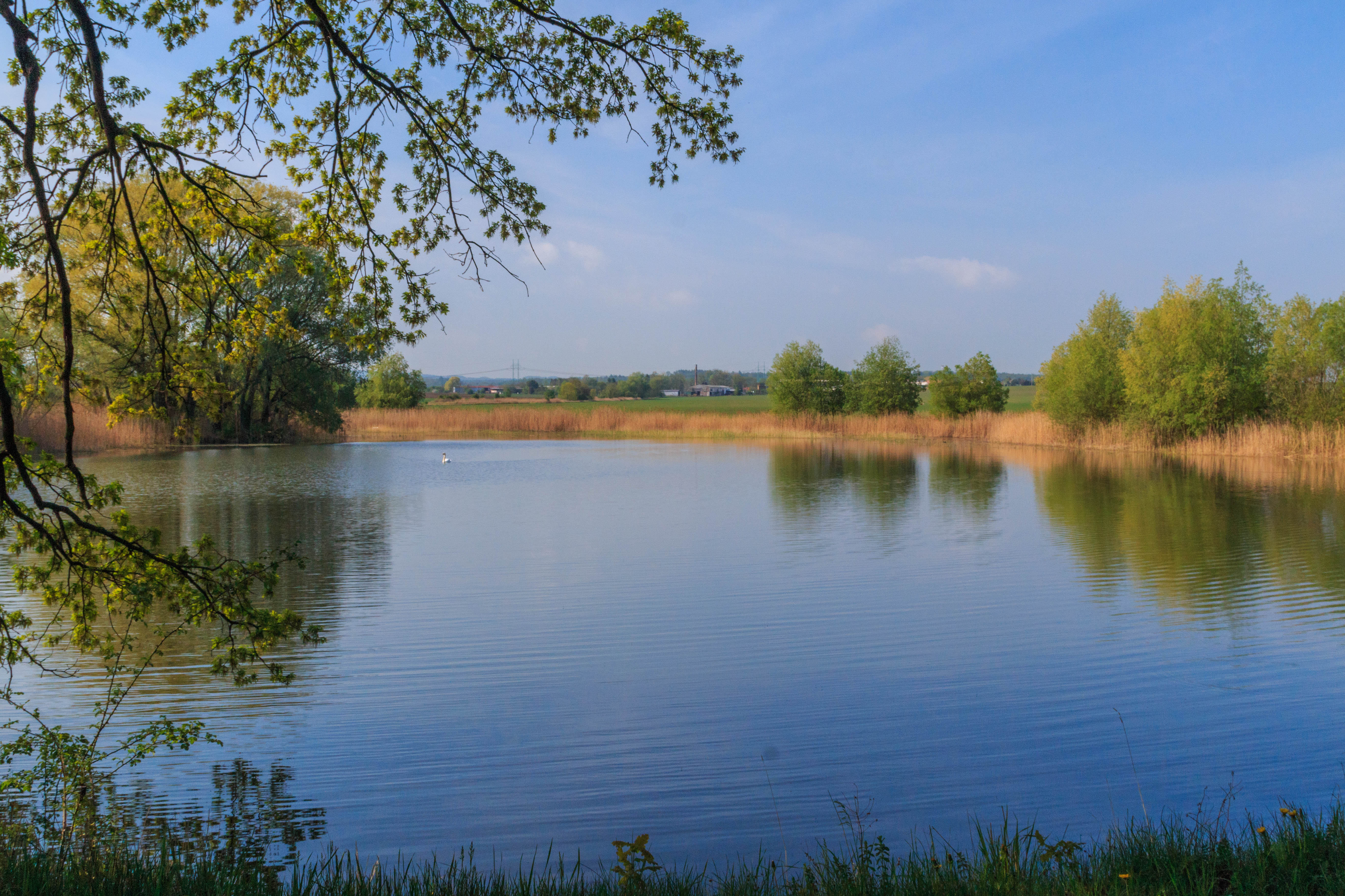 Horní rybník u Veselí u Přelouče Project: Vodstvo.